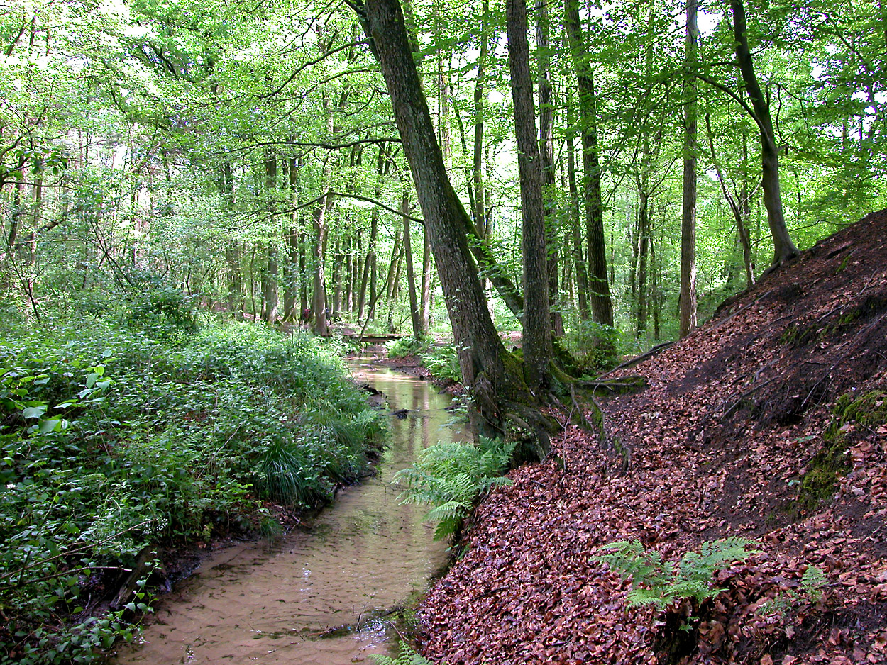 Dorsten-Rhade. Bach Kalterbach. Nord-Ost.